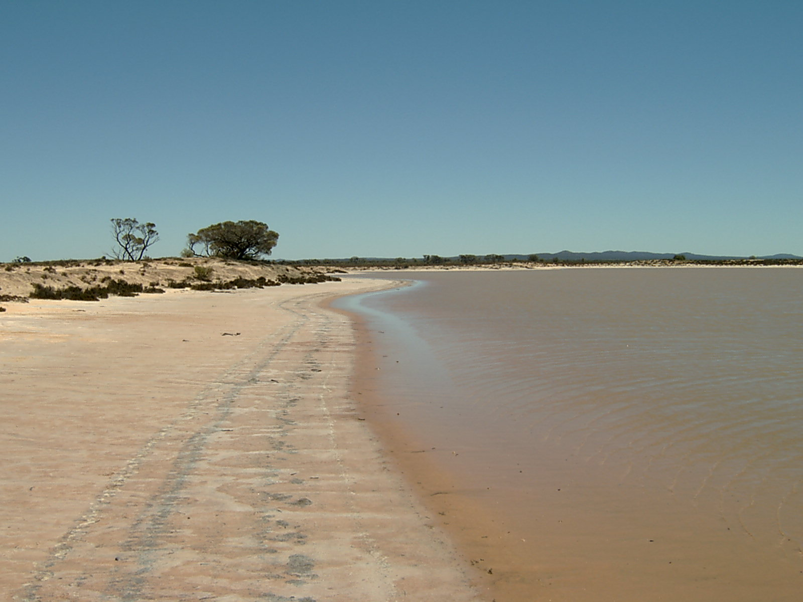 01 Lake Gilles 05